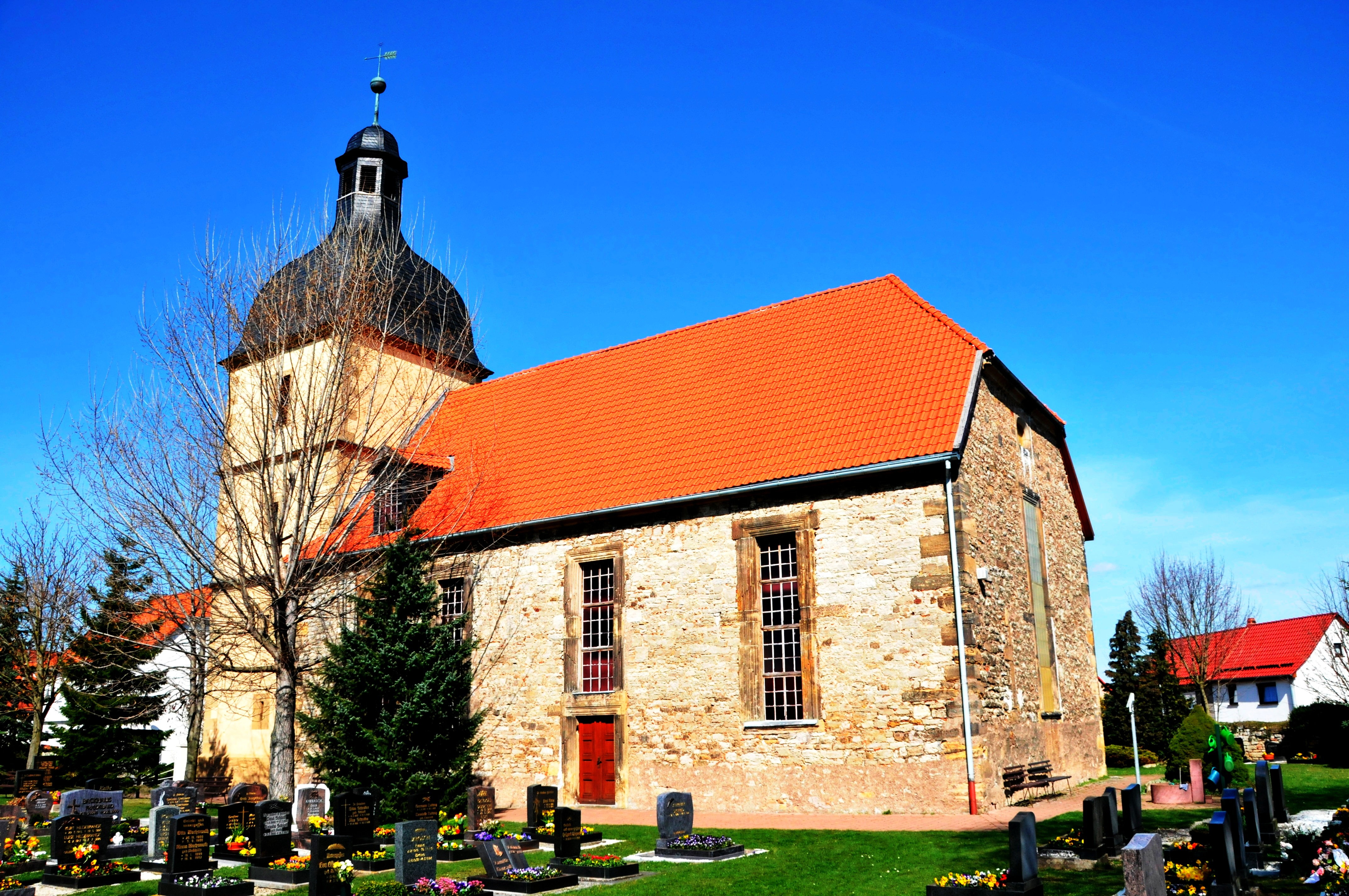 St. Trinitatis-Kirche in Schwabhausen, Landkreis Gotha